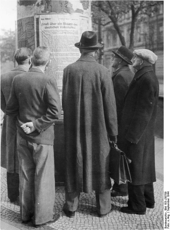 ADN-Zentralbild/ Archiv II. Weltkrieg 1939-45 Der totale Krieg in seinen Auswirkungen im faschistischen Deutschland. UBz: Den an den Litfaßsäulen in Berlin angeschlagenen Erlaß Adolf Hitlers vom 25. September 1944 über die Bildung des deutschen Volkssturms in den alle bisher nicht eingezogenen Männer im Alter von 16 bis 60 Jahren einberufen werden. 1458-44 [Scherl Bilderdienst]